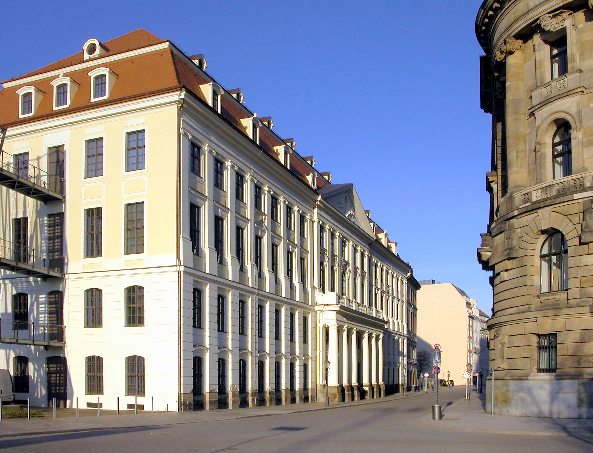 18.02.2007 Dresden-Altstadt, Landhausstraße: Altes Landhaus, frühklassizistisch (1770-1776 von F. A. Krubsacius). Heute Museum für Stadtgeschichte. Rechts das Polizeipräsidium. [DSCN21086]20070218020DR.JPG(c)Blobelt